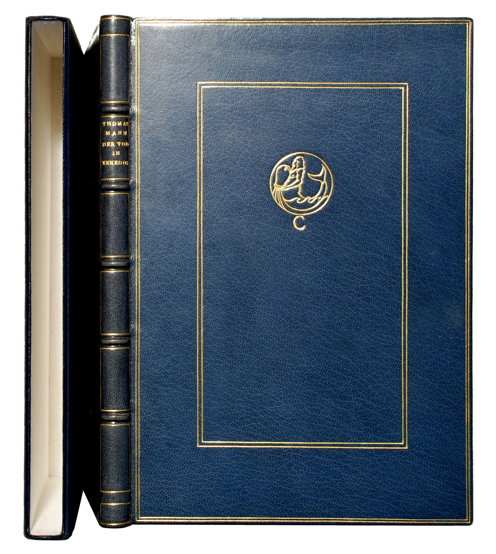 Mann, Thomas: Der Tod in Venedig. Novelle. [1] München: 13. Hundertdruck Hyperion-Verlag Hans von Weber 1912. Exemplar LXXI/C. Original-Verlagseinband (Meistereinband von E. Ludwig, Frankfurt). Erstveröffentlichung in einer Auflage von 100 Exemplaren, Potempa E 26.1 [2]; Bürgin I 8; Wlpert-Gühring² 9. Blaues Maroquin auf Bünden mit goldgeprägten rechteckigen Verzierungen zwischen den Bünden, dazwischen Autor und Titel in Goldprägung. Originasl-Schuber. Vorder- und Hinterdeckel mit zweifachen, dünnen Goldumrandungen; 4,2 x 3,4 cm messende Hundertdruck-Vignette auf dem Vorderdeckel. Prägestempel des Buchbinders unterhalb des vorderen Spiegels: „E. Ludwig Frankfurt AM“. In der Kursiv von Walter Tiemann bei Poeschel & Trepte in Leipzig gedruckt auf weißem, geripptem Bütten mit Hundertzeichen; rauer Schnitt. Vormals Sammlung Lucy Spiegel (Exlibris).